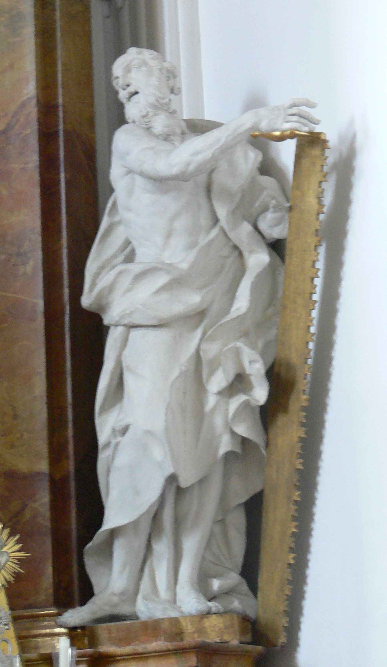 Marienmünster Dießen (ehem. Augustiner-Chorherren-Kirche Mariä Himmelfahrt, heute Pfarrkirche, Dießen am Ammersee)